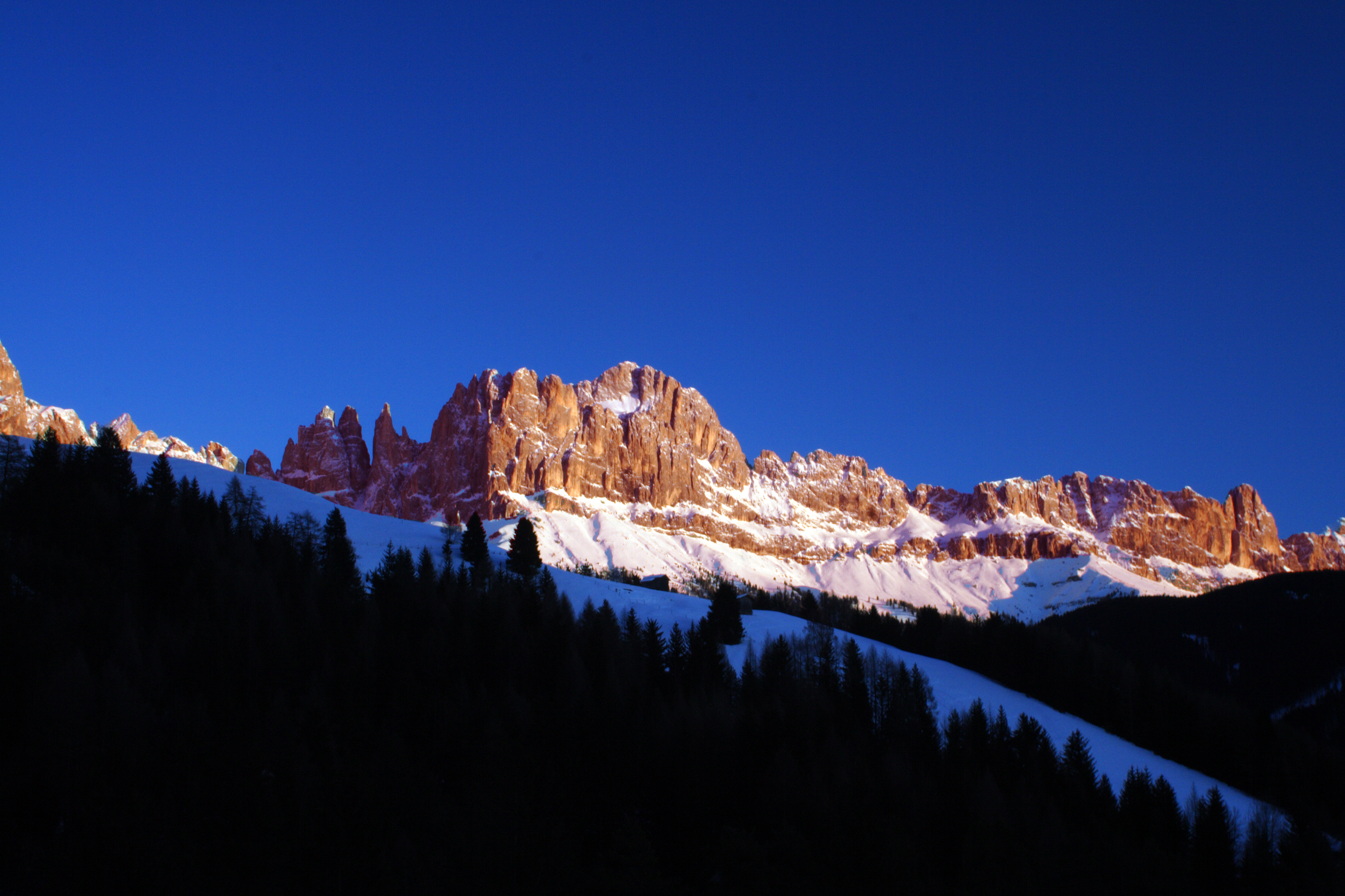 Rosengarten im Abendrot von Weisslahnbad aus betrachtet